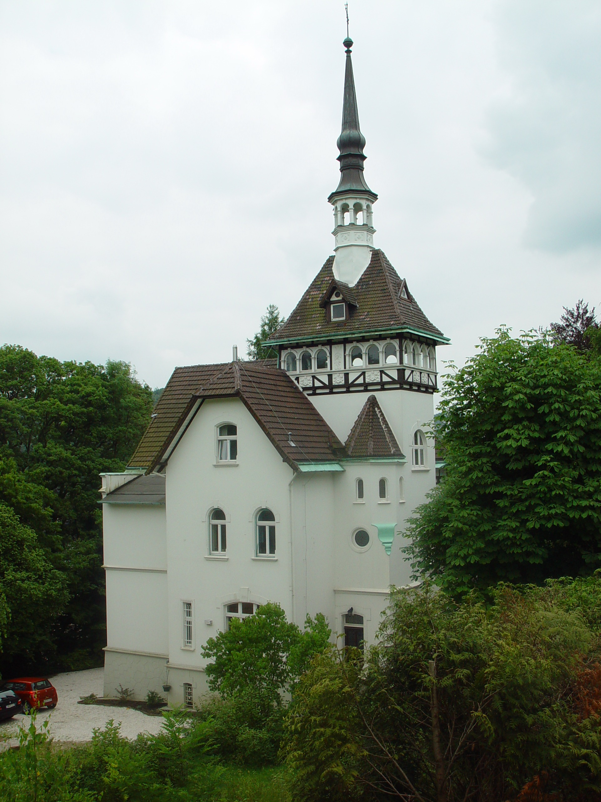 Villa Altenloh in Ennepetal This is a photograph of an architectural monument.